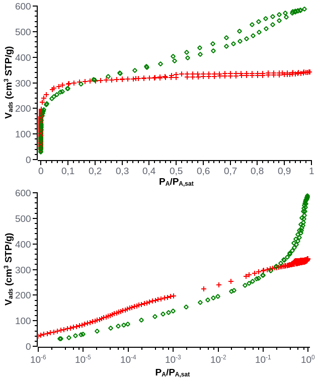 Isothermes d'adsorption de diazote à 77K pour deux carbones activés commerciaux